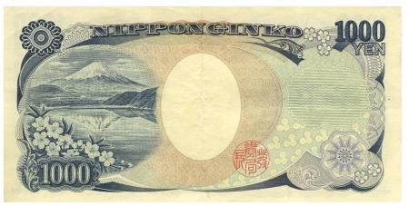 1000 Yen E Serie Rückseite